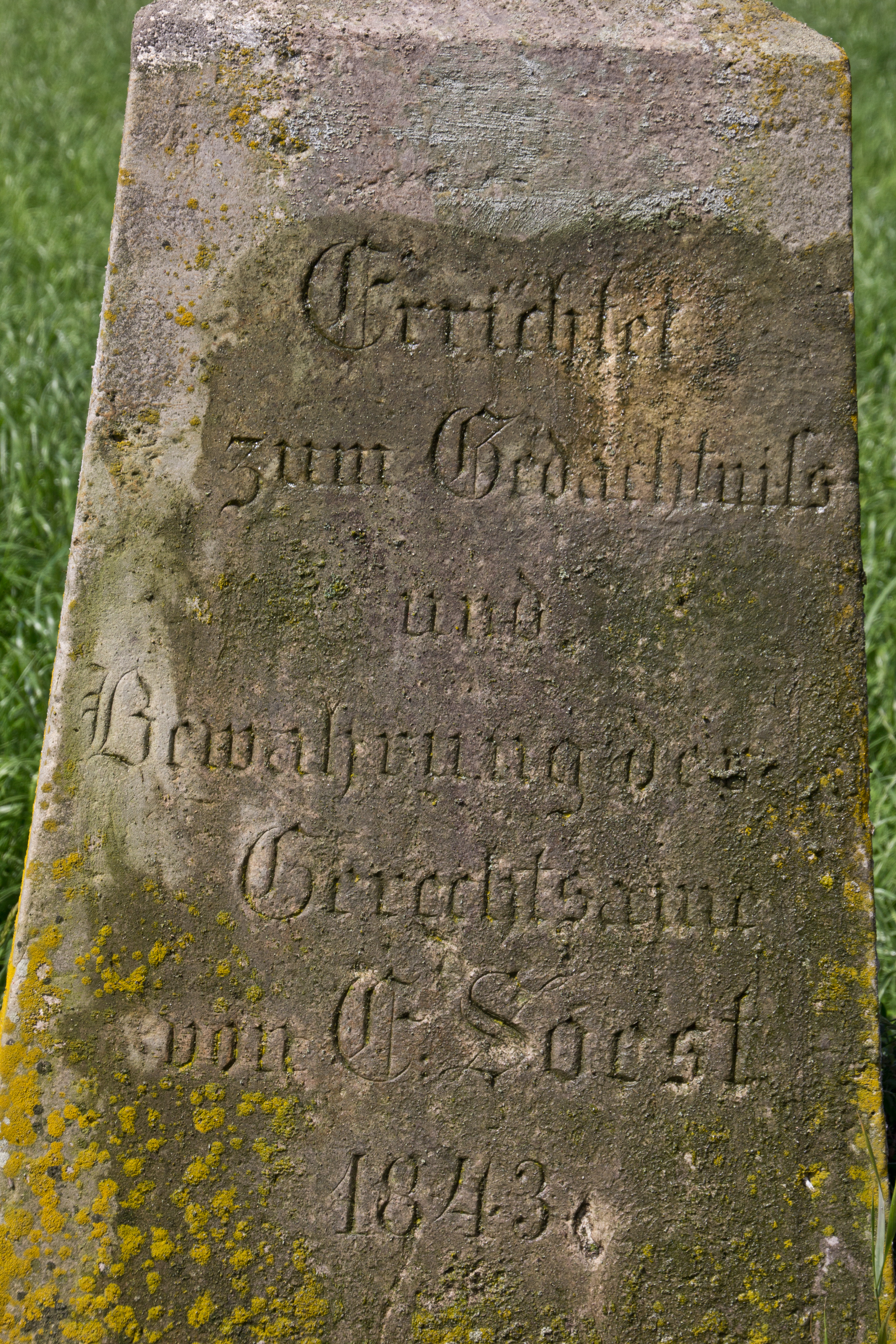 Beschriftung des Obelisken zur St. Annener Str. zeigend